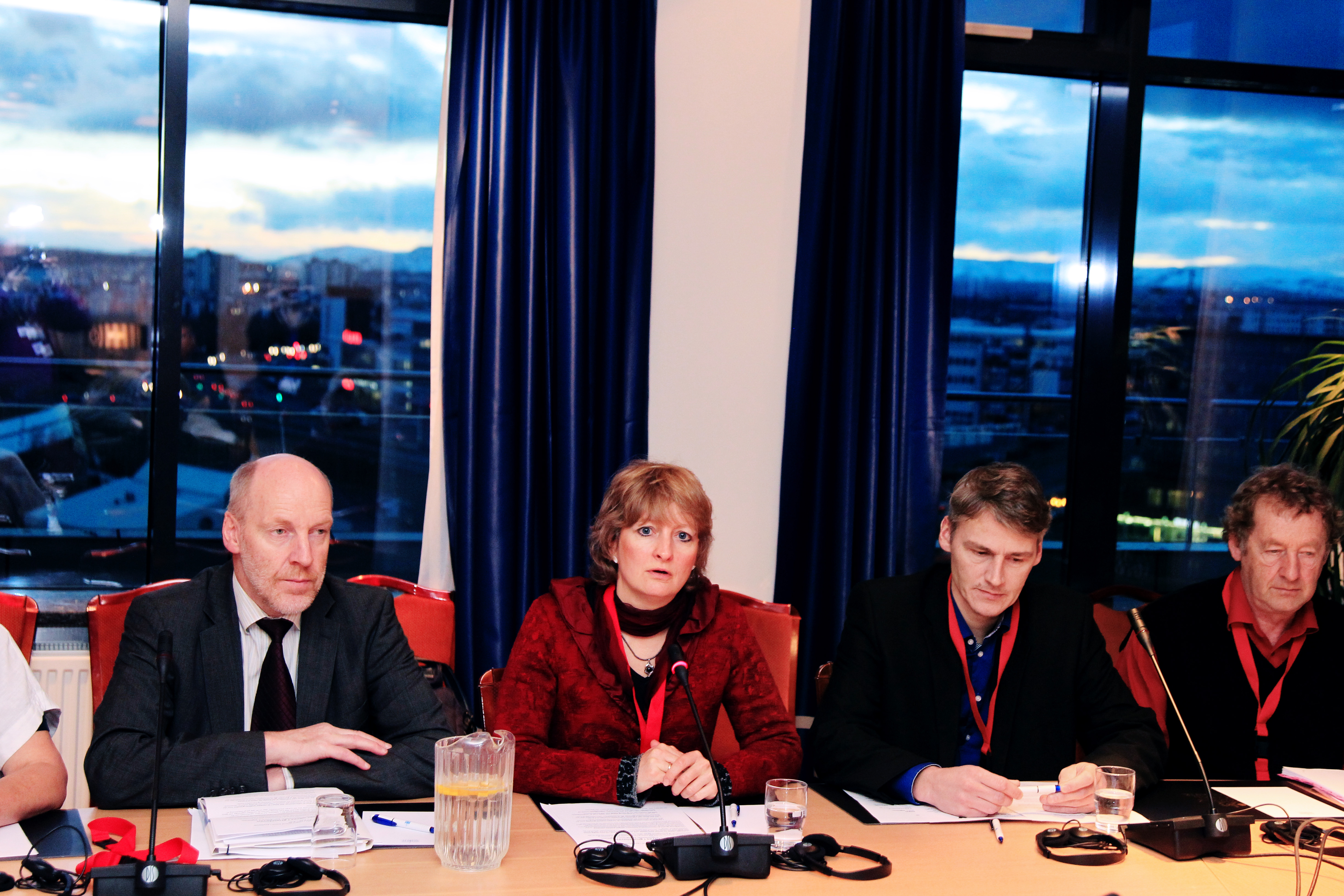 Nordiska rådets vänstersocialistiska grupp håller pressmöte. Nordiska rådets session 2010. Høgni Hoydal (T), Line Barfod, Steingrímur J. Sigfússon